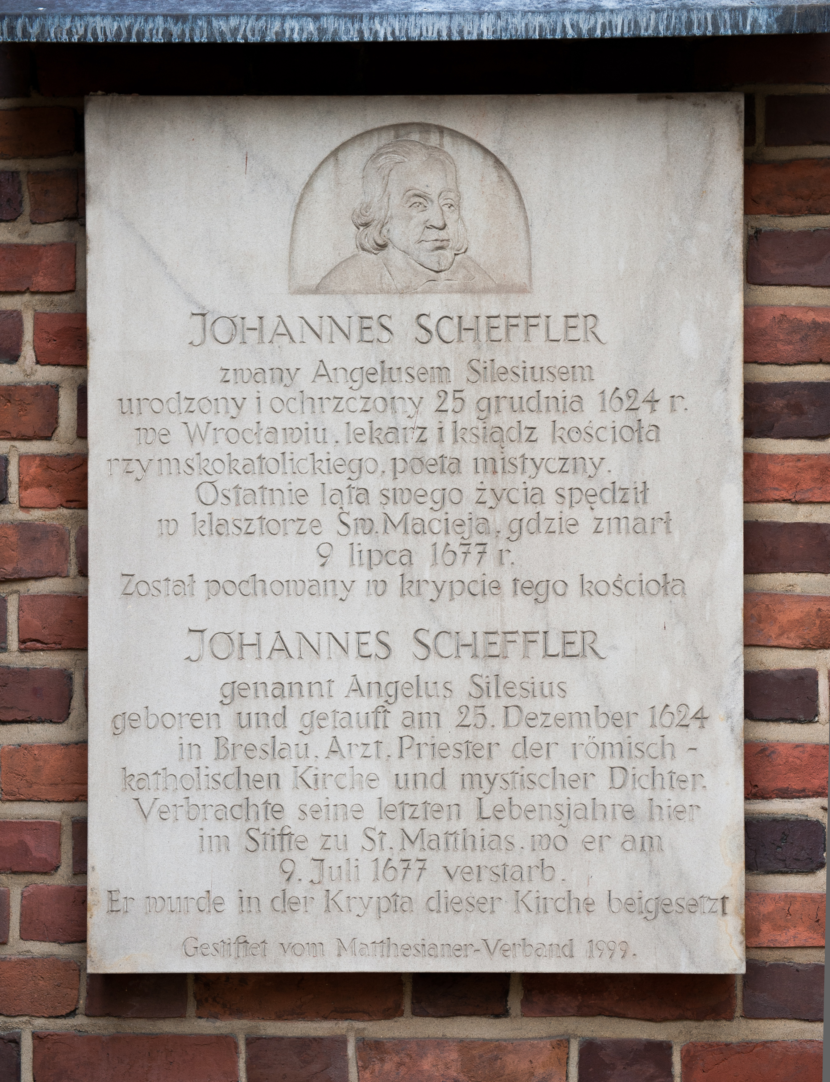 Tablica pamiątkowa poświęcona Johannesowi Schefflerowi na ścianie kościoła św. Macieja we Wrocławiu, ul. Szewska 36a.